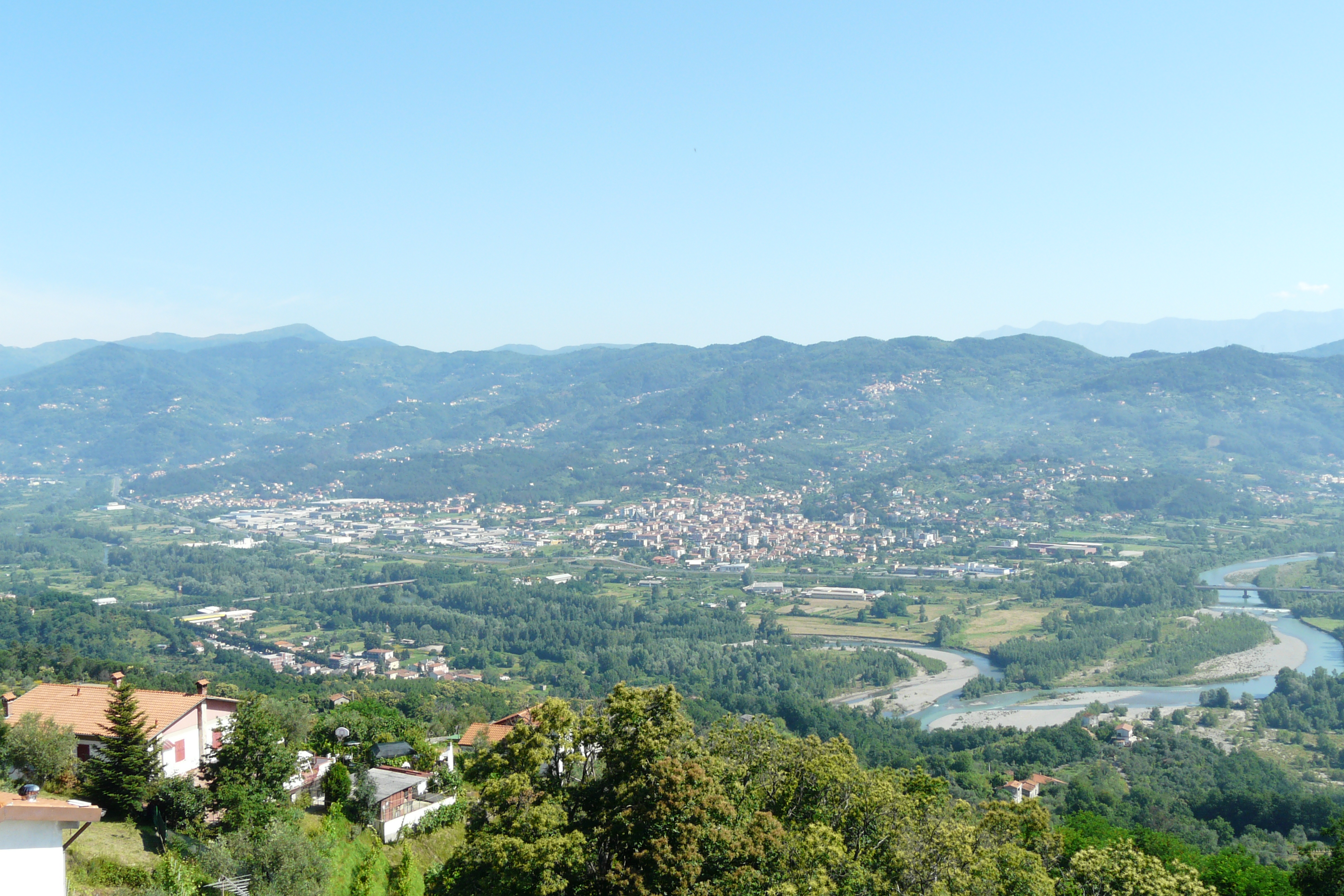 Piana di Ceparana, Bolano, Liguria, Italia